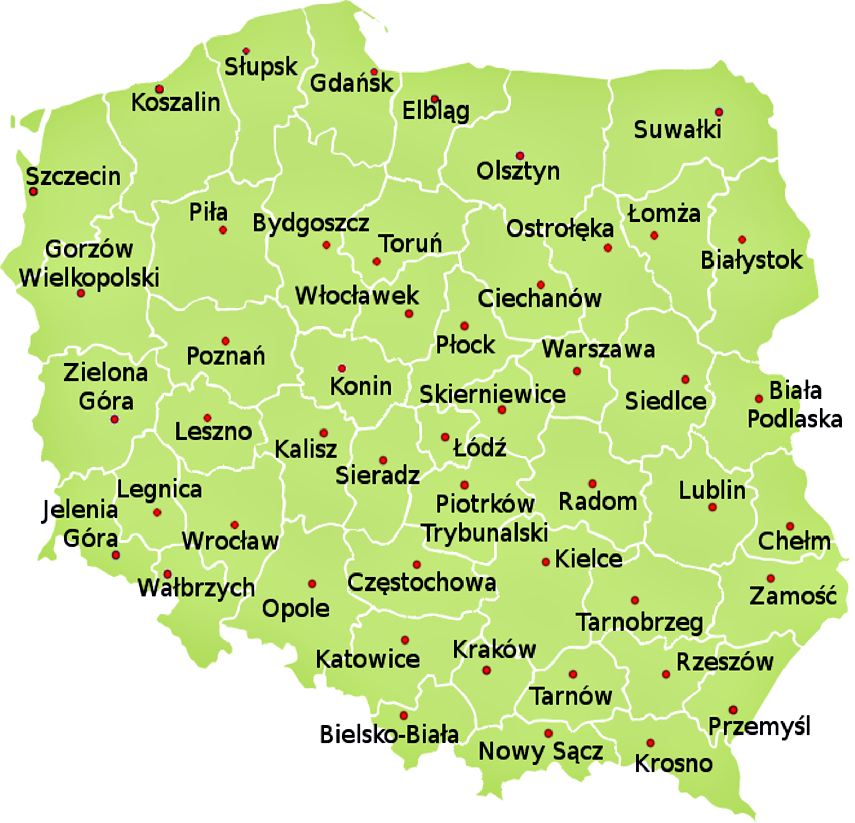 Mapa 49 województw Polski w latach 1975–1998 by DemostenesBlade